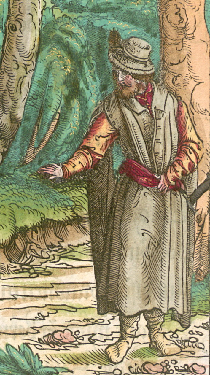 Образ, предположительно, основанный на внешнем виде страдиота.